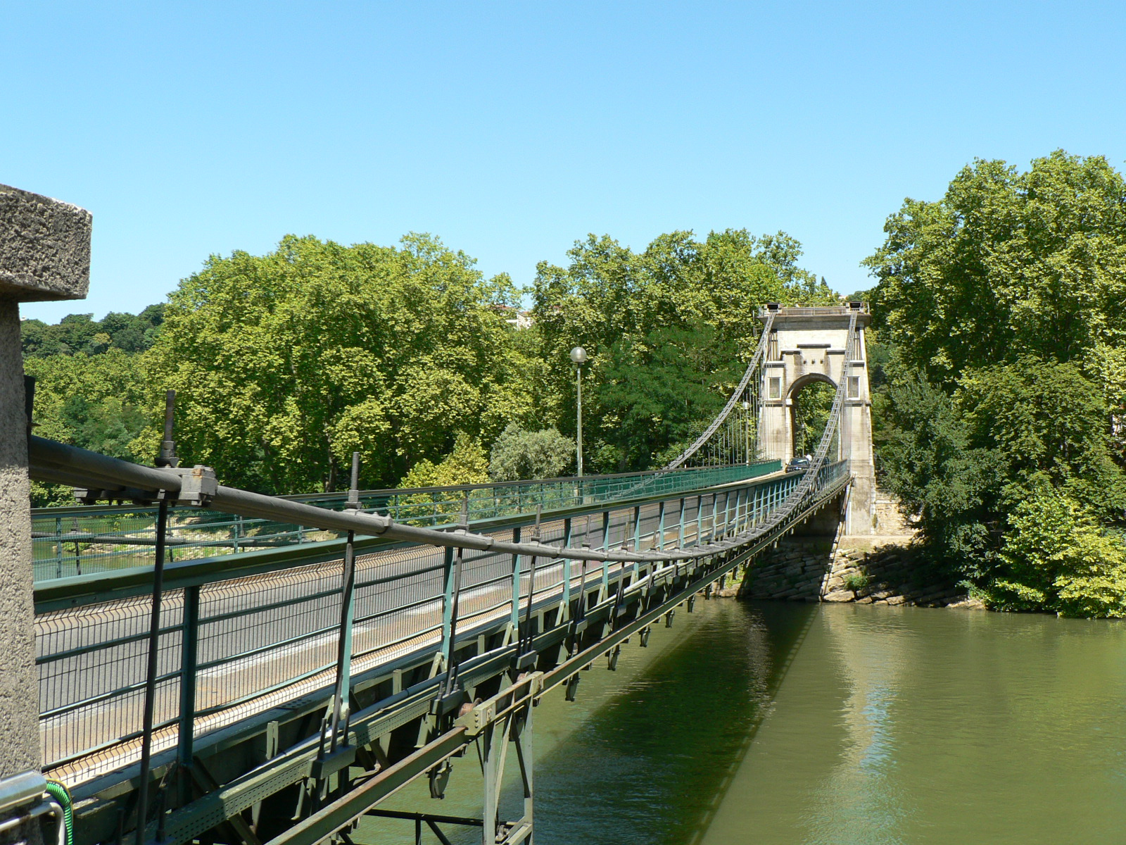 Ponts de Lyon - Pont de l'Île Barbe, rive gauche